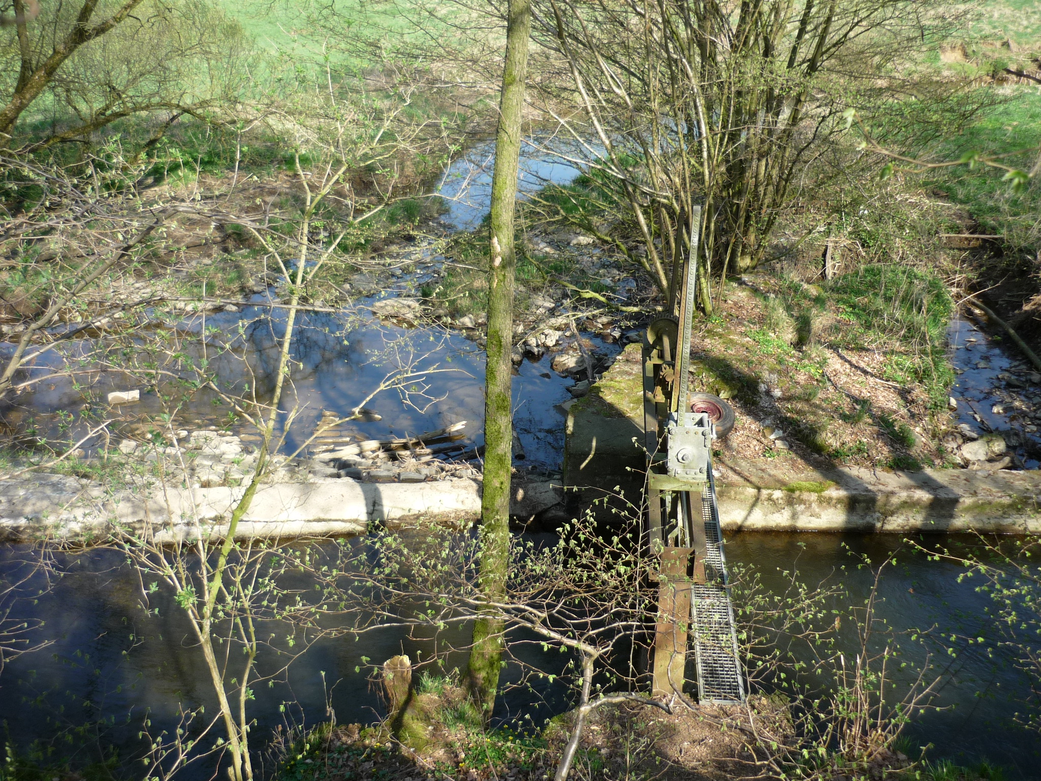 Wied bei Widderstein: Abzweigung des Mühlengarbens zum Michelbacher Wasserkraftwerk